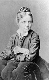 Зоф'я Адамаўна Тшашчкоўская